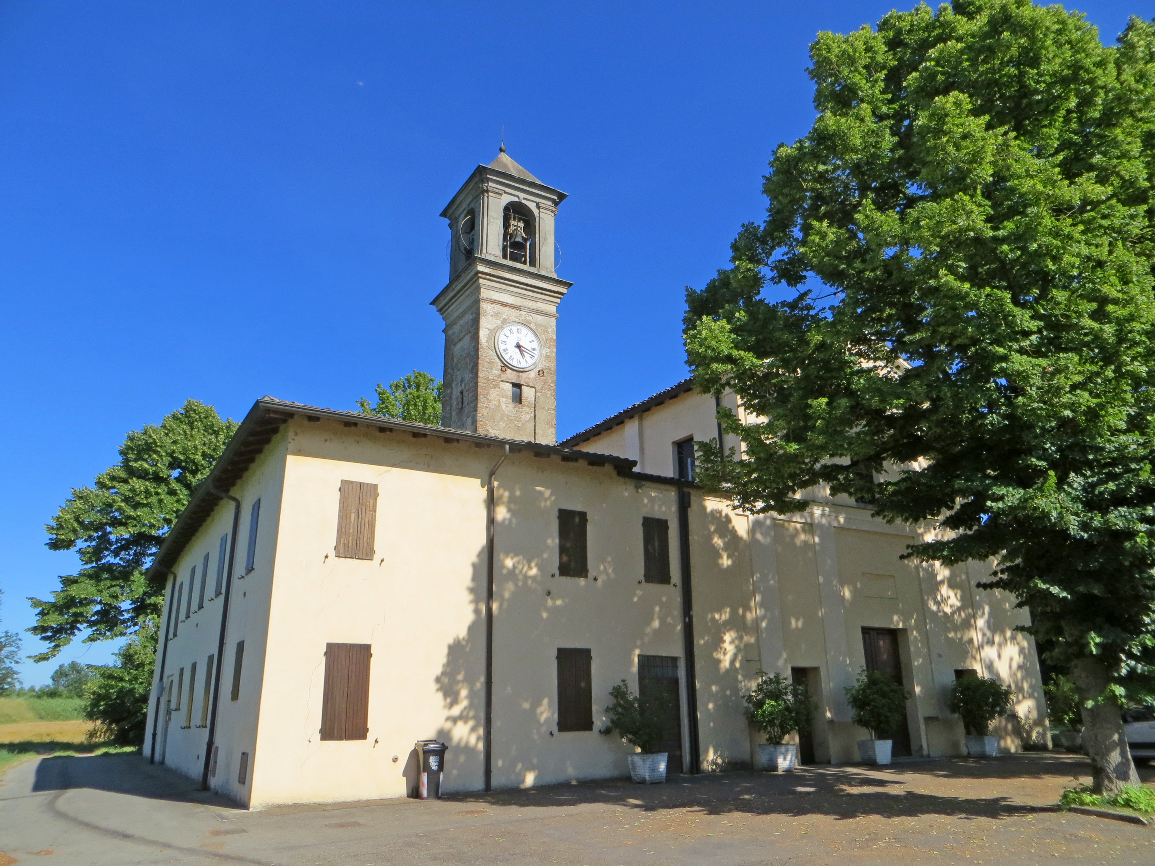 Chiesa della Purificazione di Maria Vergine (Vicomero, Parma) - facciata e canonica